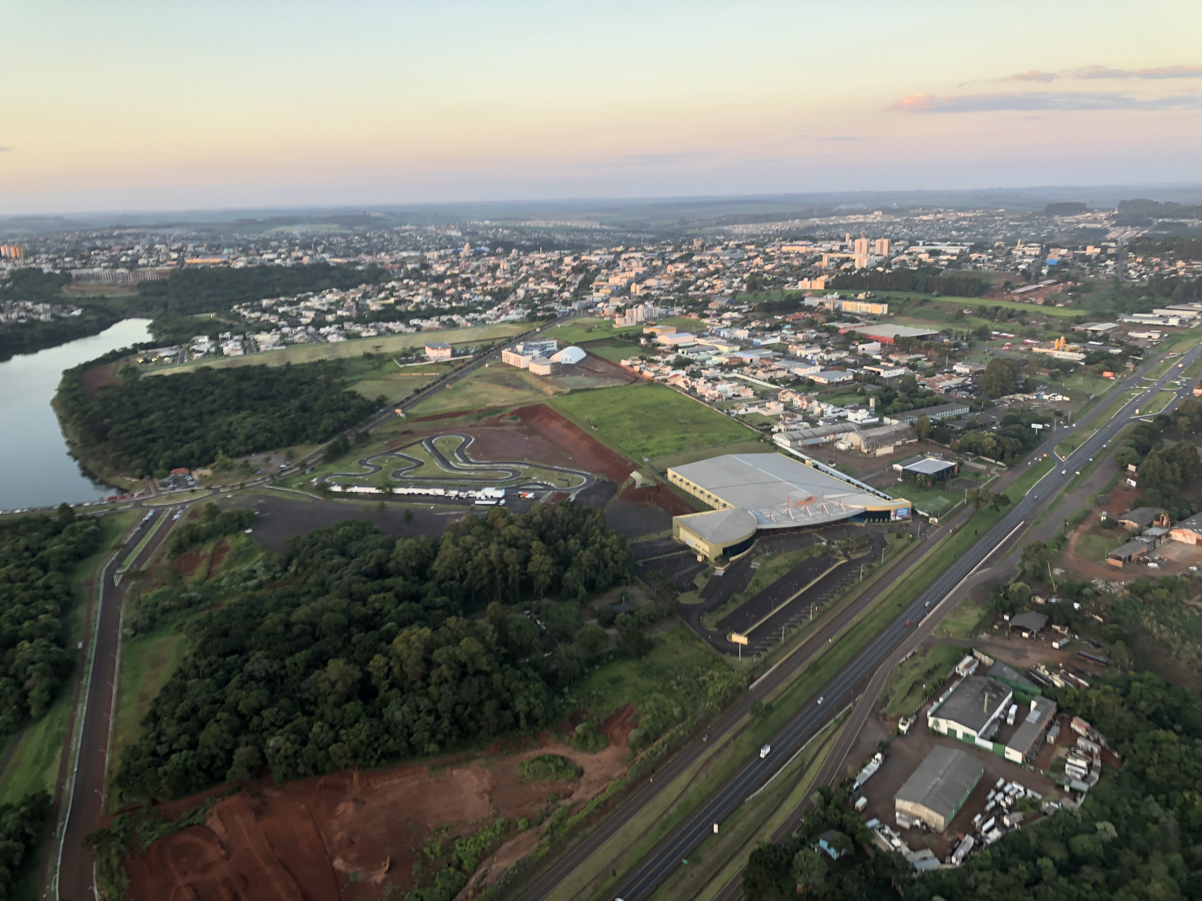 Voo de Paramotor sobre a cidade de Cascavel no estado do Paraná - Brasil